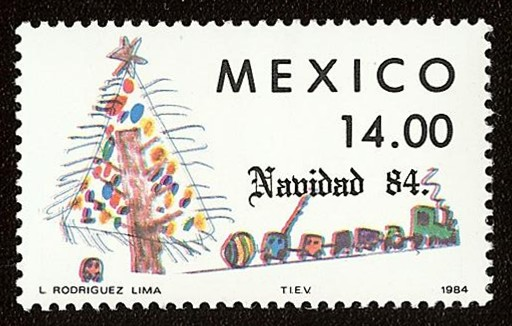 Estampilla de Motivo Navideño: dibujo infantil de un tren de juguete y un árbol navideño